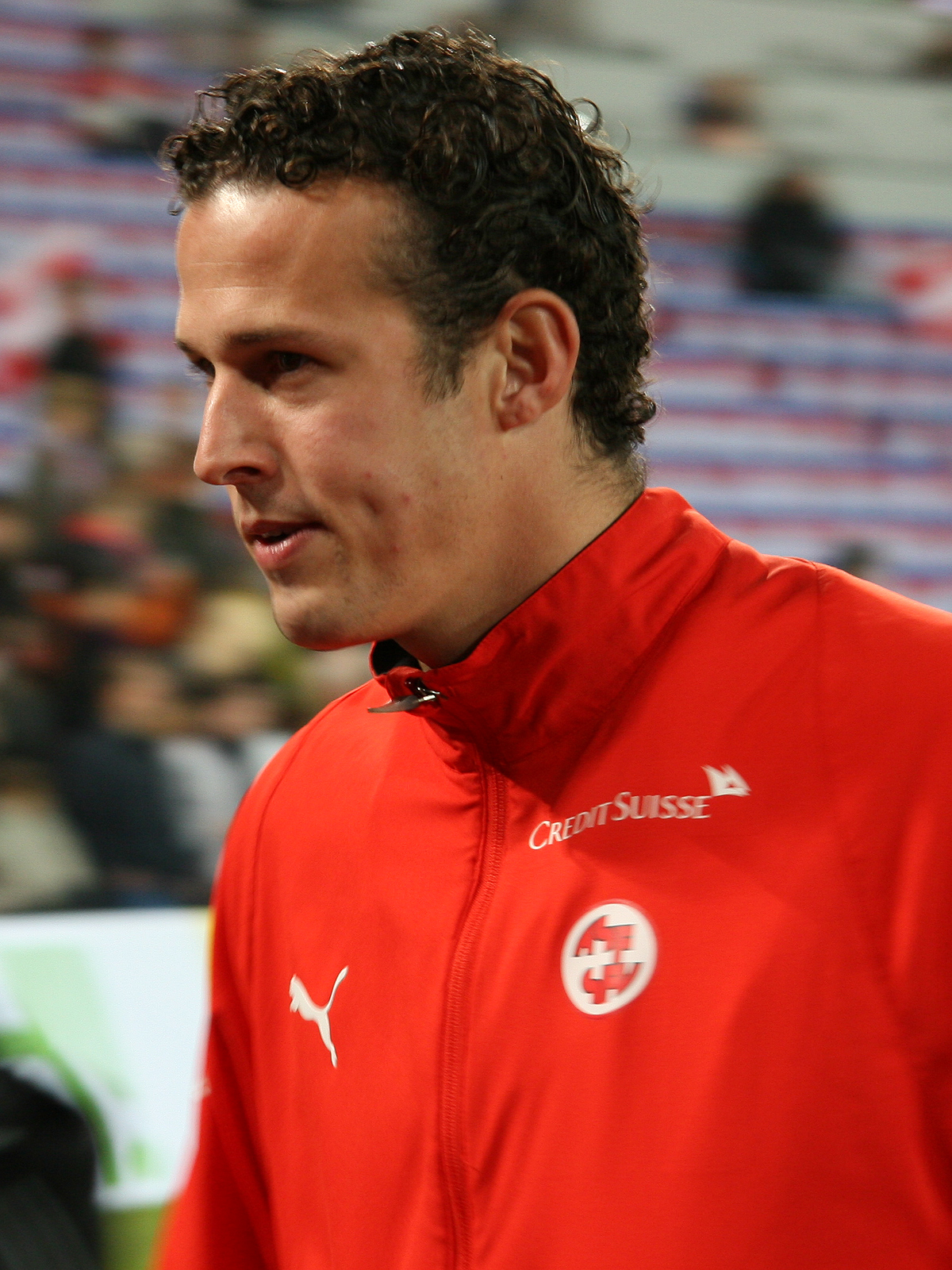 Marco Streller, St. Jakob Stadion, Basel (Switzerland), Switzerland - Brasil 1:2